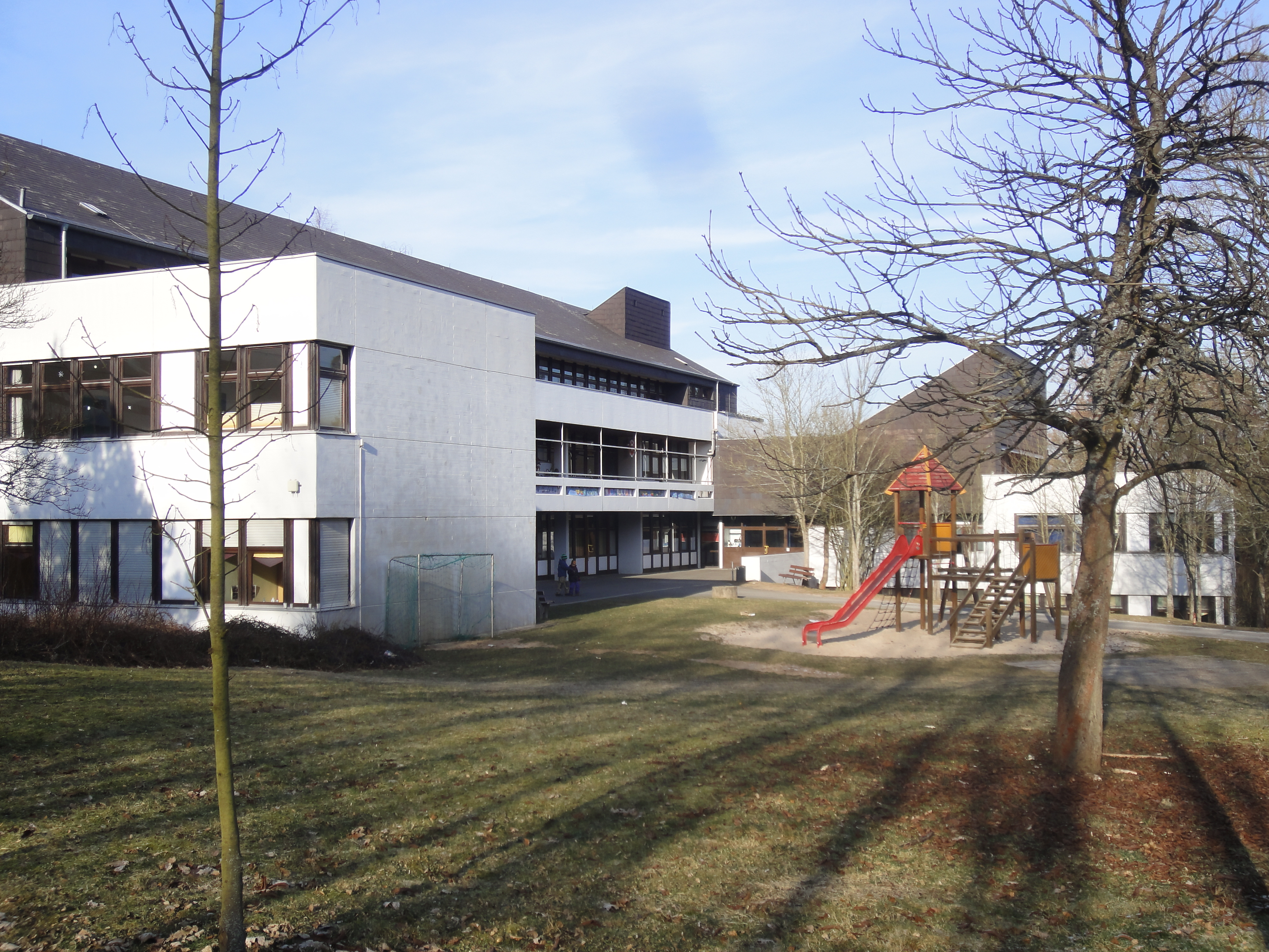 Klinikum am Rehberg